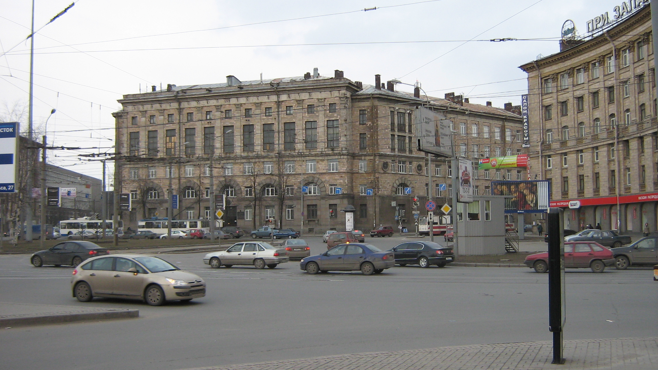 Svetlanovskaya Square